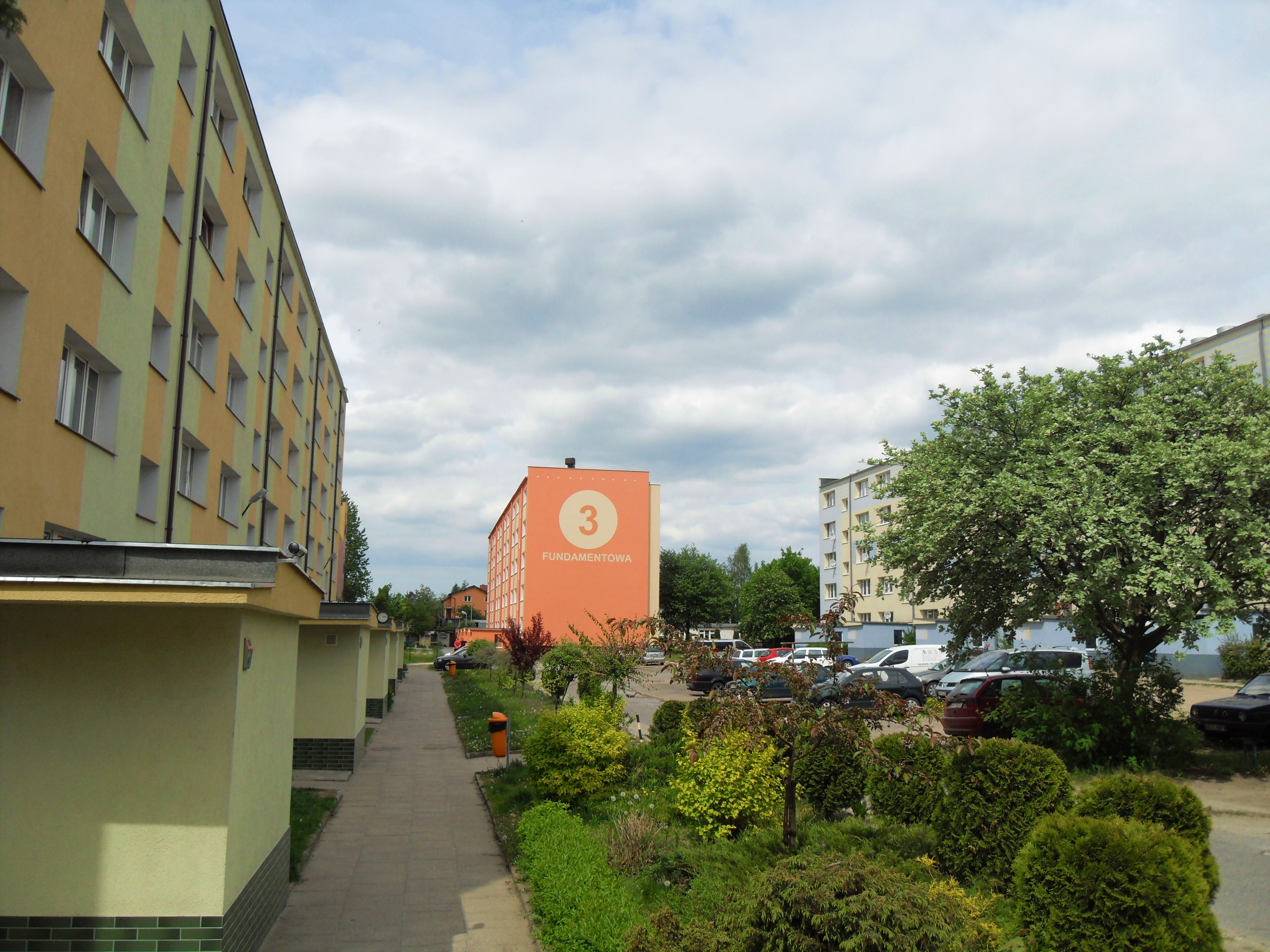 Gdańsk Kokoszki, bloki przy ul. Fundamentowej.